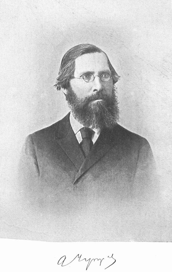 Чупров, Александр Иванович